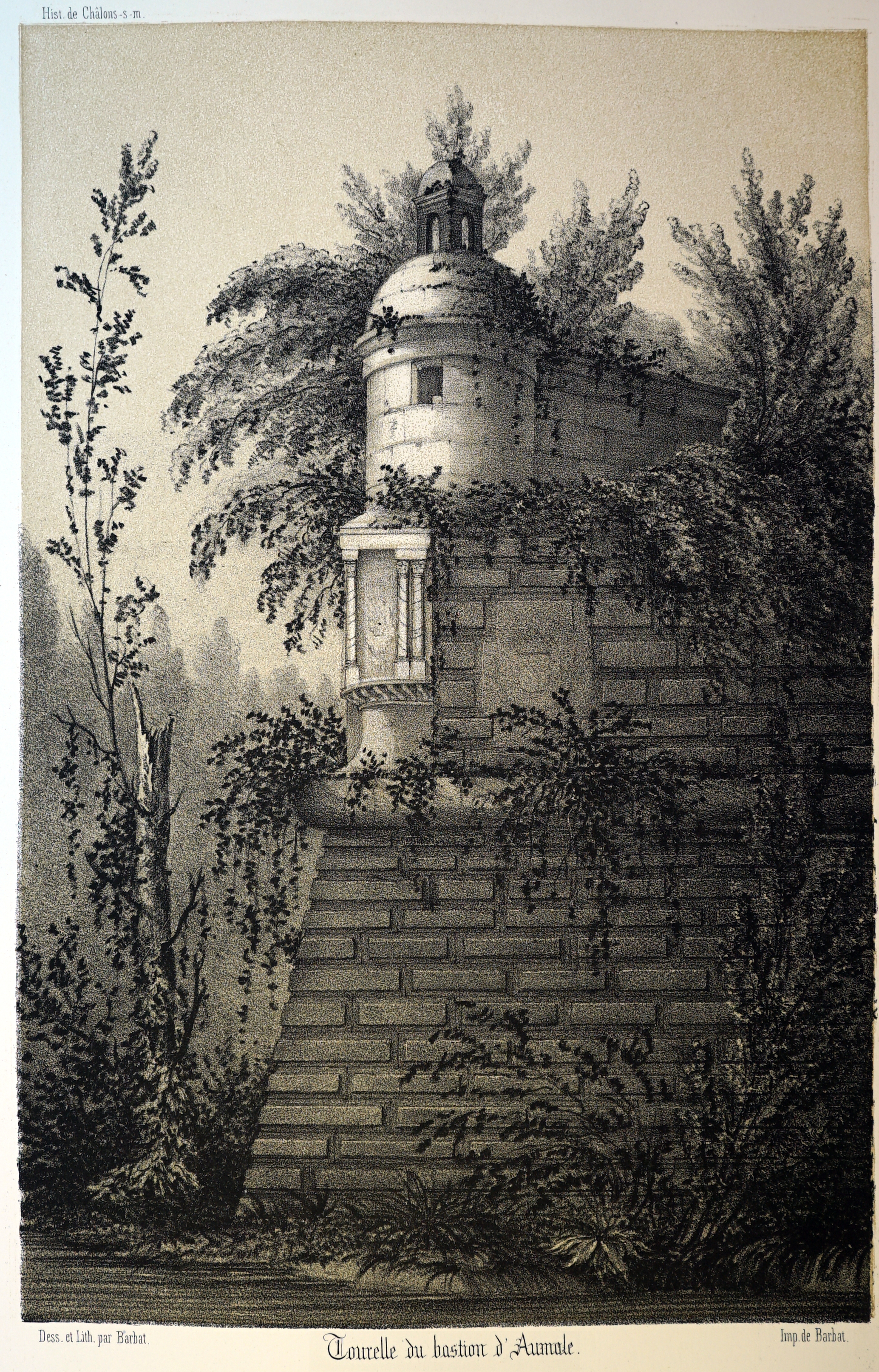 extrait du livre de Barbat.